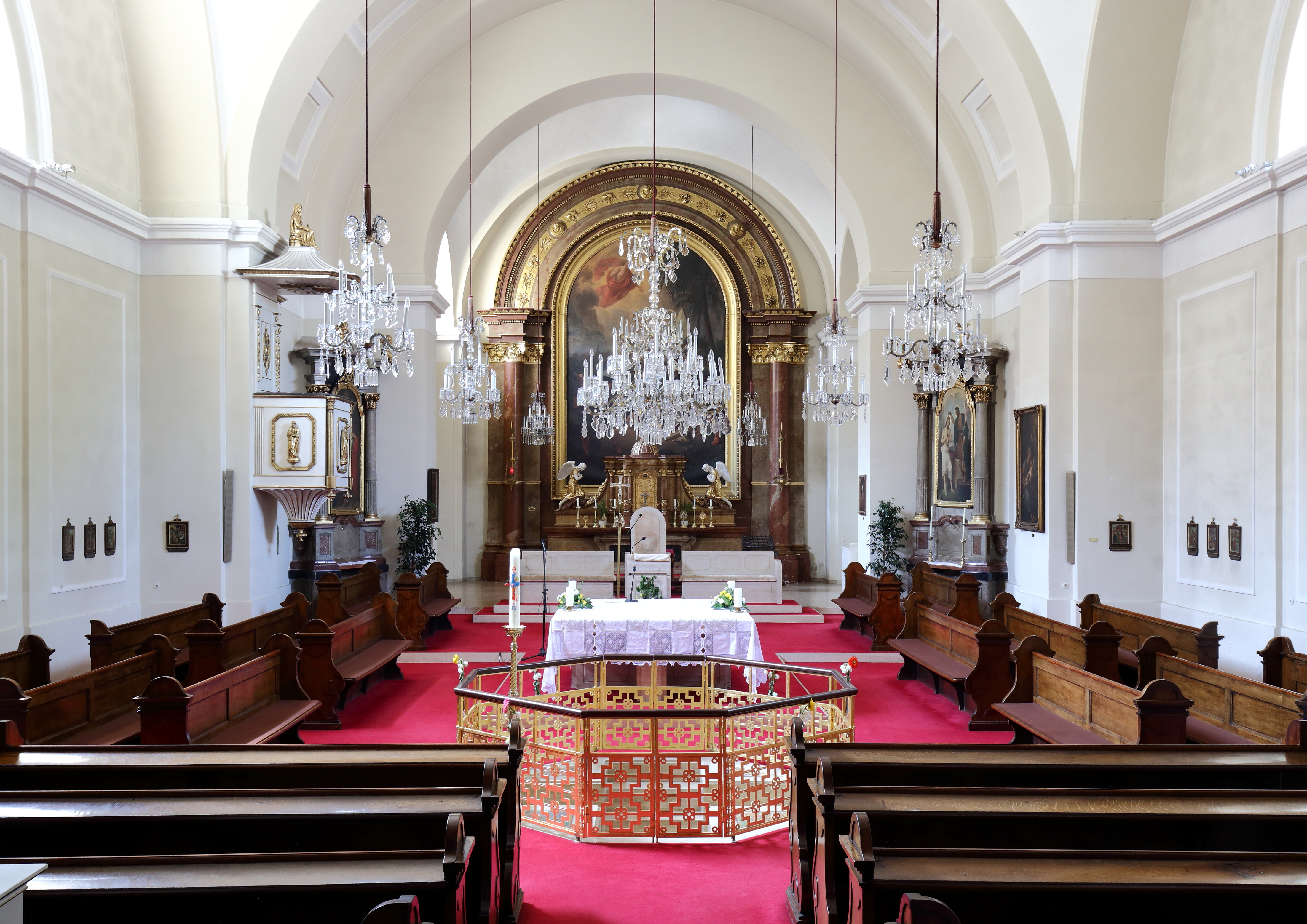 Innenansicht Richtung Hochaltar der römisch-katholischen Pfarrkirche hl. Paul im 19. Wiener Gemeindebezirk Döbling. Die Kirche wurde 1828/29 von dem Baumeiser Josef Reininger errichtet. Das Altarbild Bekehrung des hl. Paulus ist ein Werk von Josef Schönmann aus dem Jahr 1829. Im Vordergrund das in den Boden eingelassenen Taufbecken; errichtet 1988 nach einem Entwurf von Georg Bachmayr-Heyda.